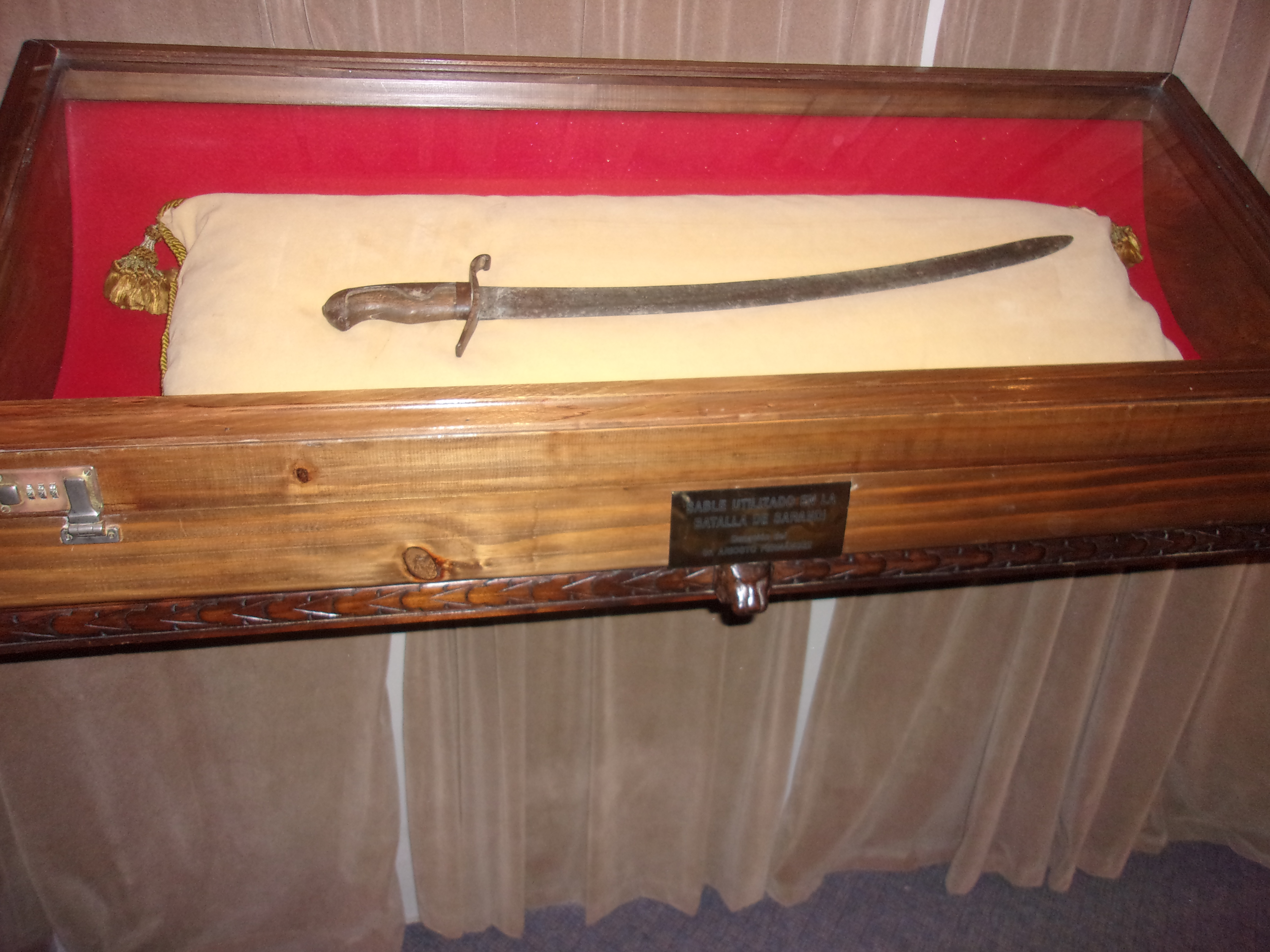 Sable original del Gral. Artigas.